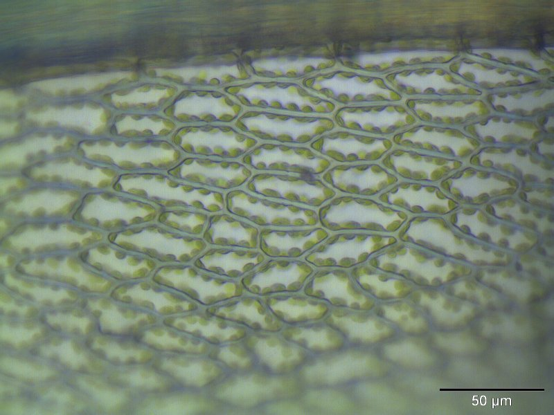 Geneigtfrüchtiges Birnmoos (Bryum imbricatum), Laminazellen, Vergrößerung: 400x